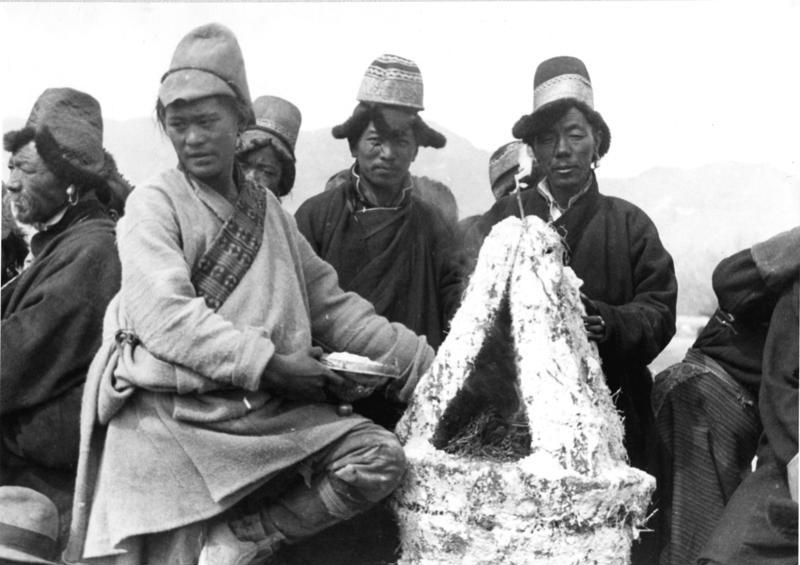 Lhasa, Neujahrsfest